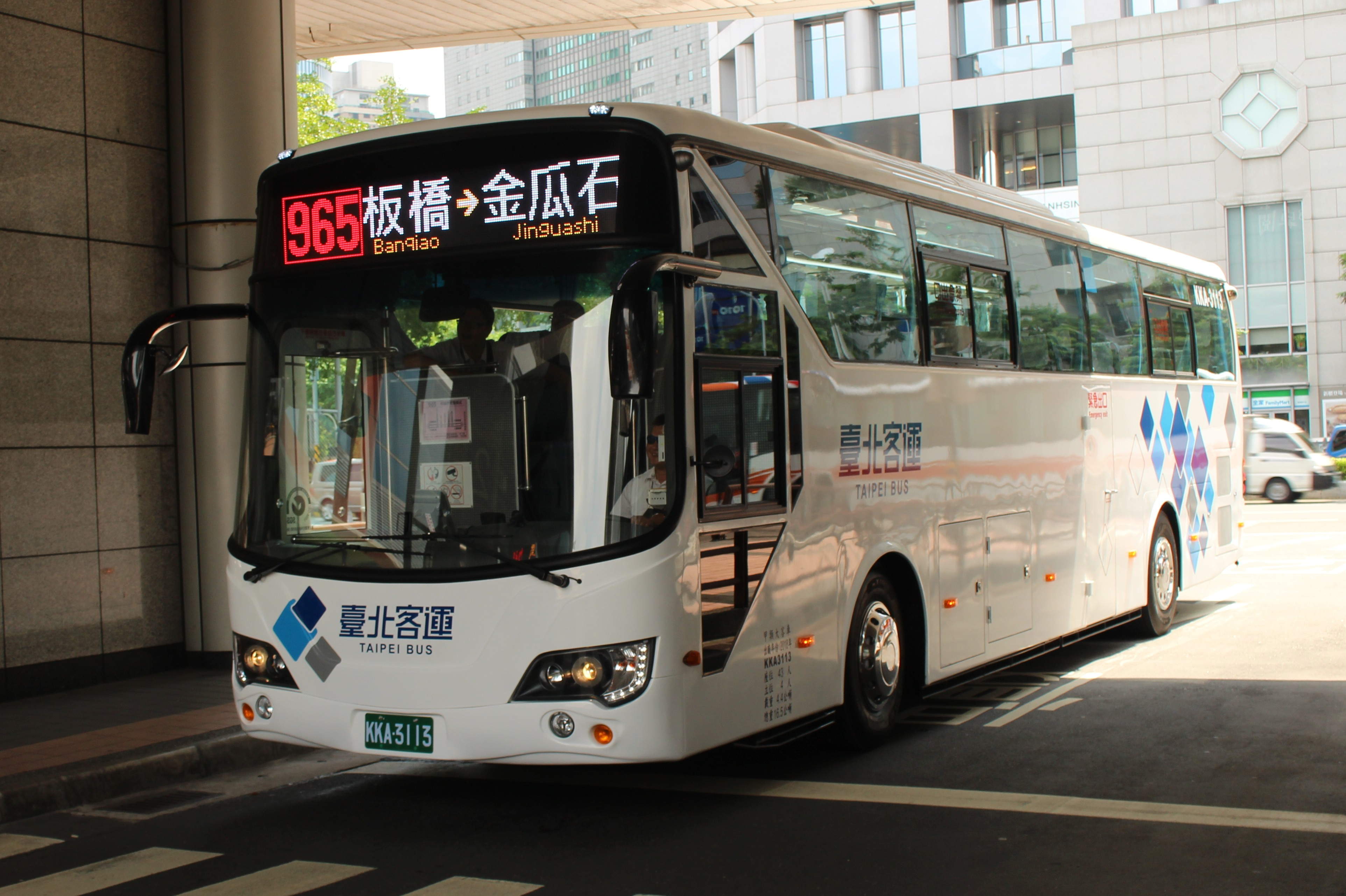 臺北客運日野RM8JSVU-SSF大客車KKA-3113 行駛965線 試車